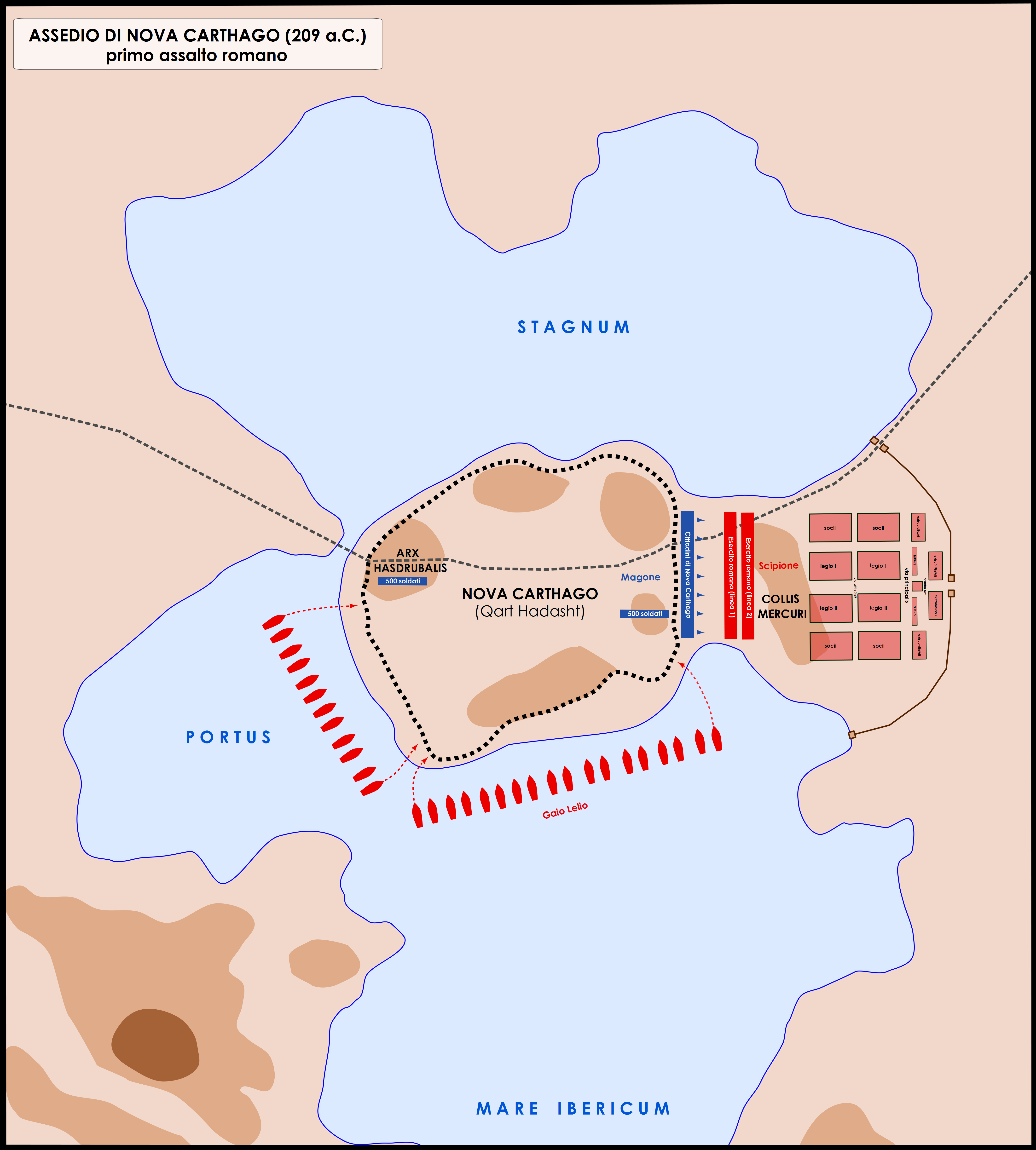 Assedio di Nova Carthago da parte di Scipione Africano - primo assalto (209 a.C.)